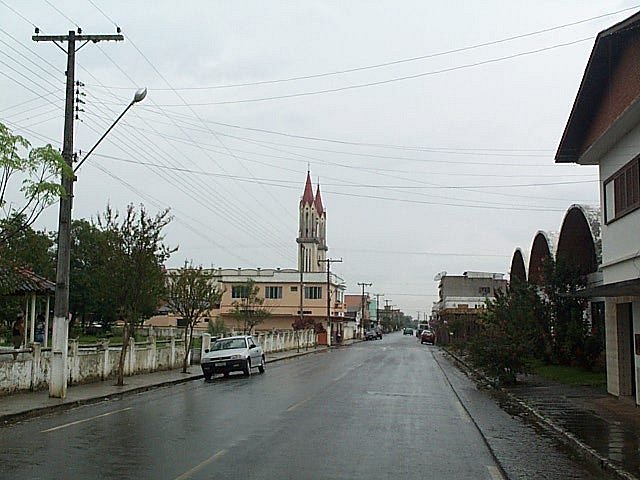 Rua Irineu Bornhausen, ao fundo a igreja matriz da cidade.